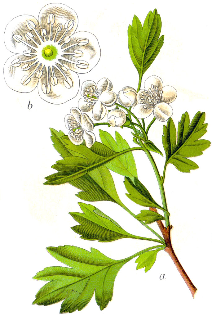 FloraWeb.de: Eingriffliger Weißdorn, Crataegus monogyna Jacq. s. l. : Crataegus monogyna var. monogyna, syn. Mespilus monogyna (Jacq.) All. Original Caption Eingriffeliger Weissdorn, Mespilus monogyna